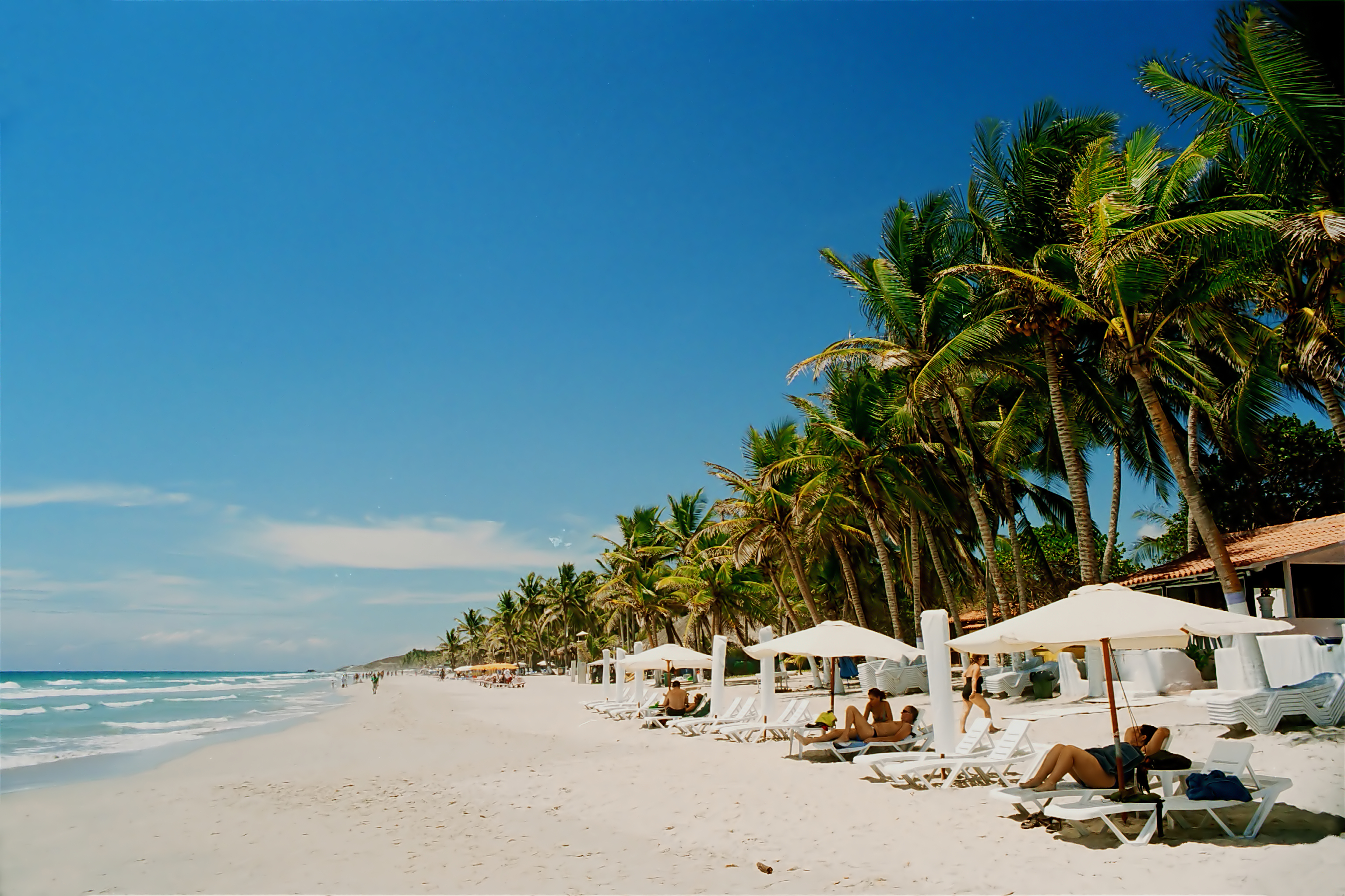 Playa El Agua, Isla de Margarita, Venezuela.